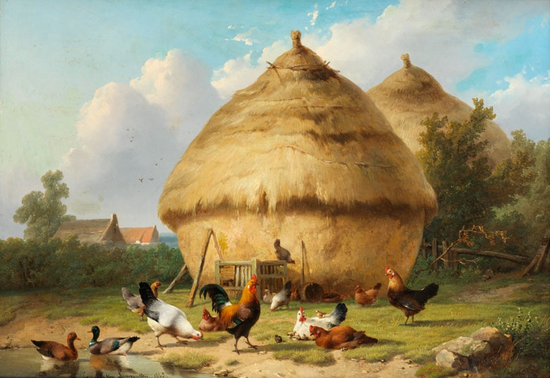 Strohhaufen mit Federvieh, Öl auf Holz, 38 x 53 cm. Links unten signiert und datiert.